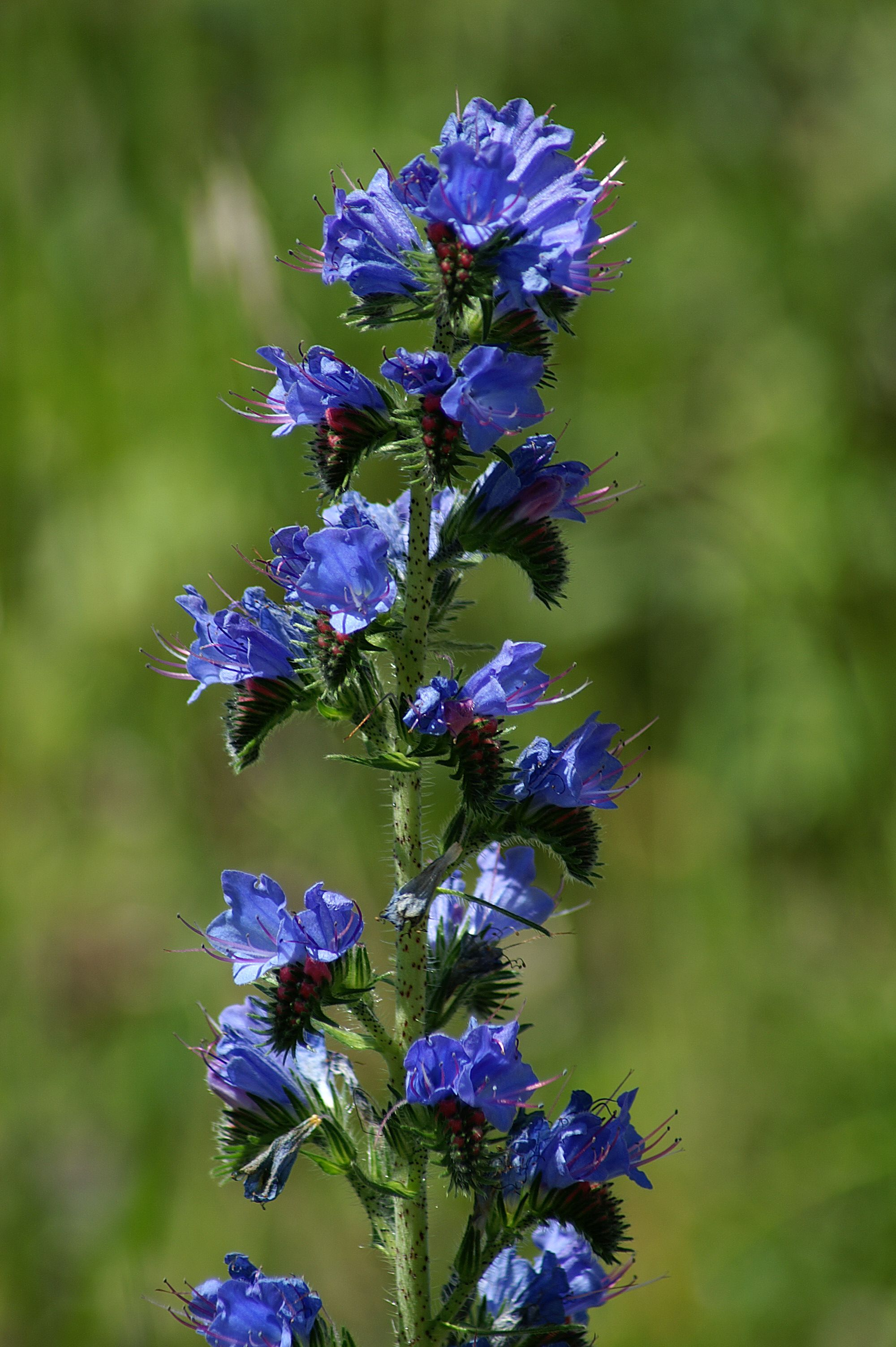 Der Gewöhnliche Natternkopf (Echium vulgare) ist eine Pflanzenart aus der Familie der Raublattgewächse (Boraginaceae). In Österreich im Volksmund auch "Himmelbrand", "Starrer Hansl" oder "Stolzer Heinrich" genannt. Gesehen im Bregenzerwald in Au, am Argenbach